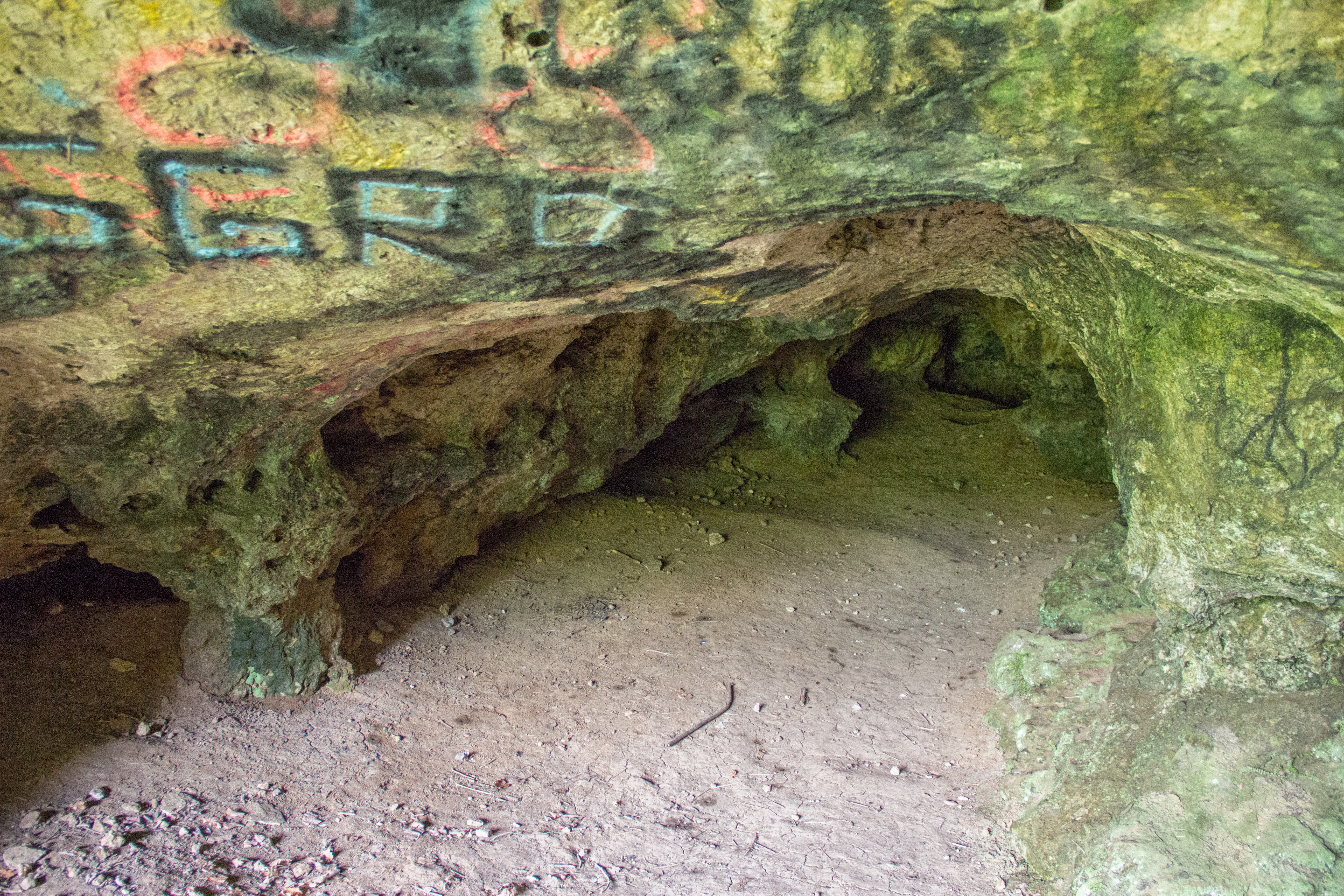 Felslindl, innen, Karsthöhle, Geotop, Naturdenkmal, Naturpark Fränkische Schweiz-Veldensteiner Forst, Auerbach i.d.OPf.